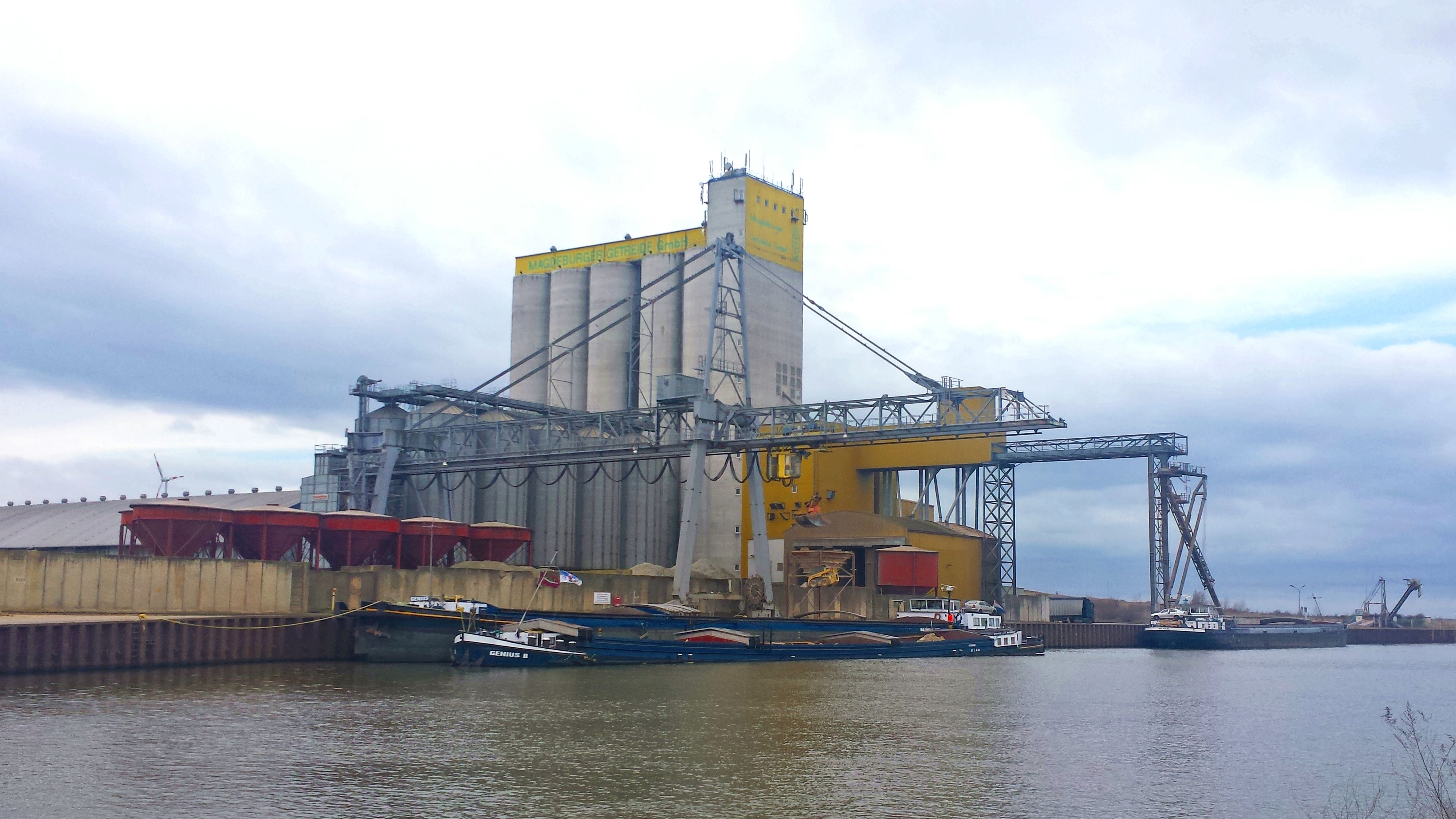 Hafen am Mittellandkanal in der Niederen Börde, Ortschaft Vahldorf